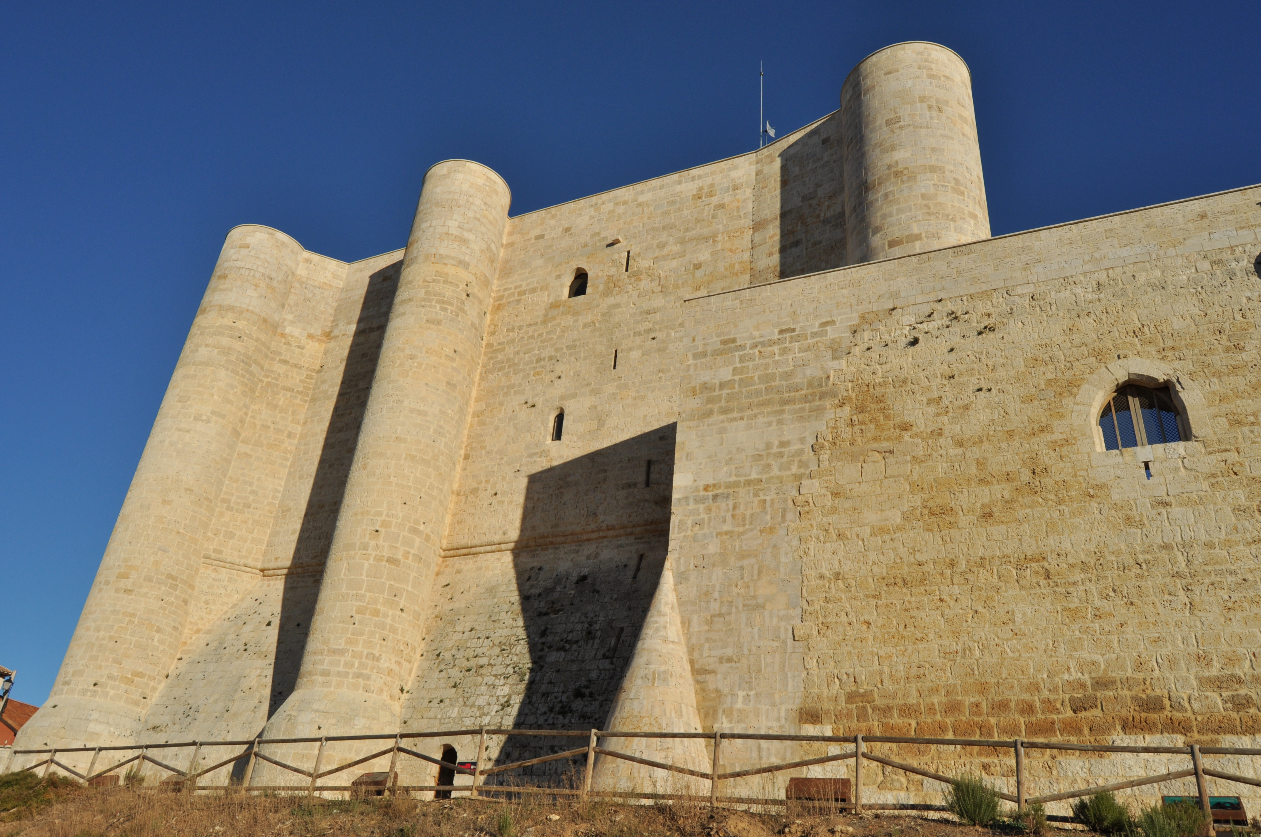 Fuentes de Valdepero - 004